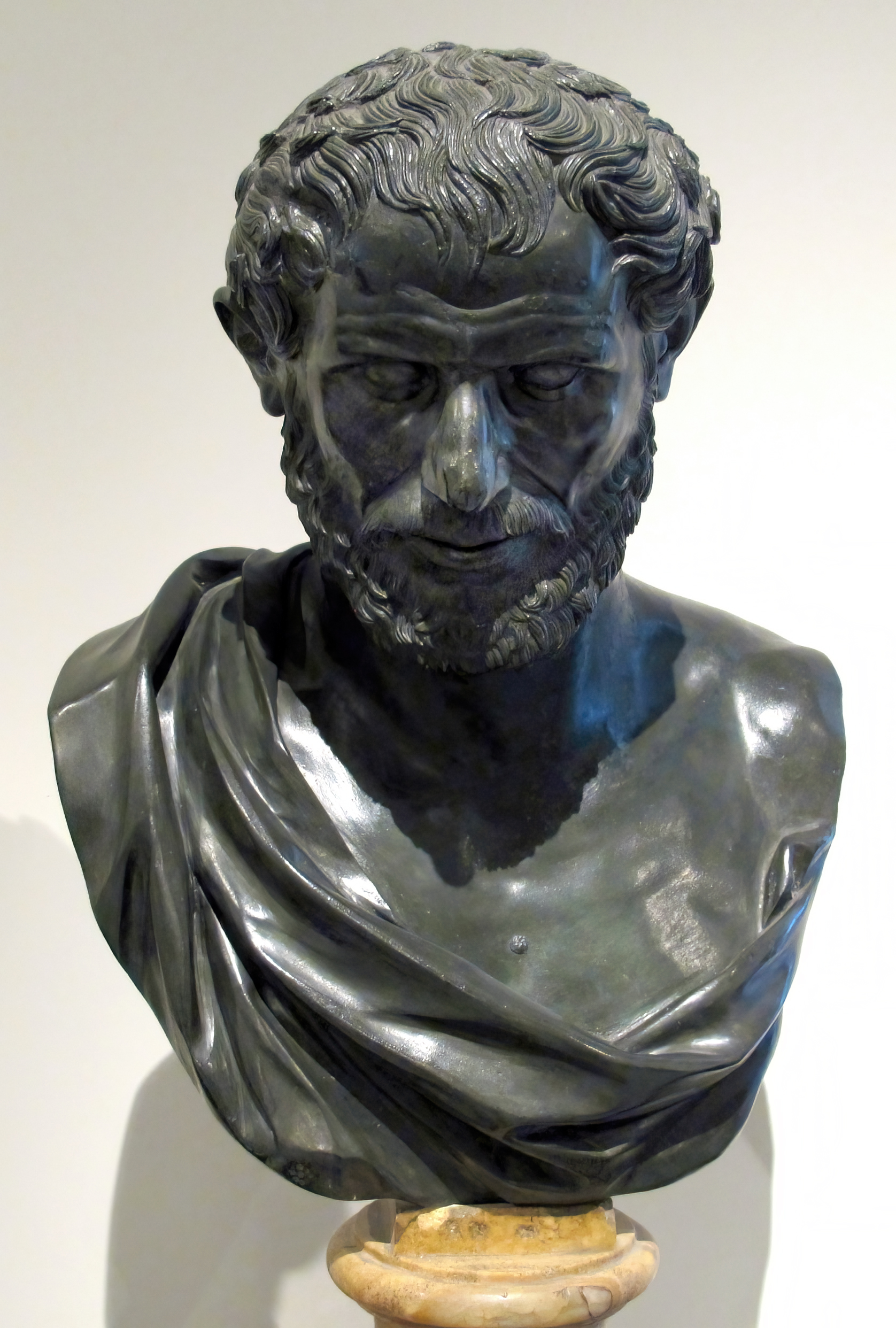 Ancient Roman art from the Villa of the Papyri (Herculaneum)